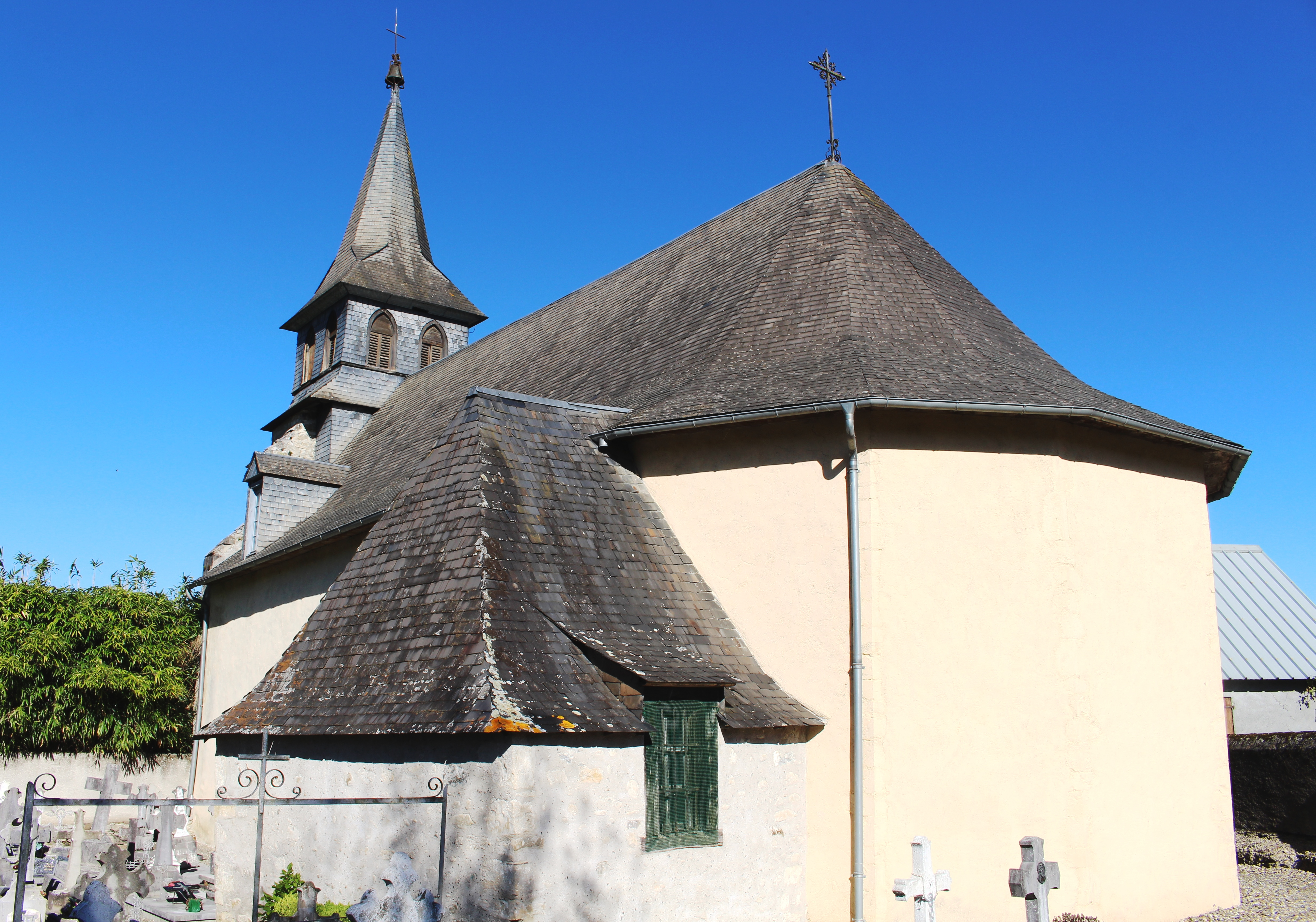 Église Saint-Martin d'Antist (Hautes-Pyrénées)